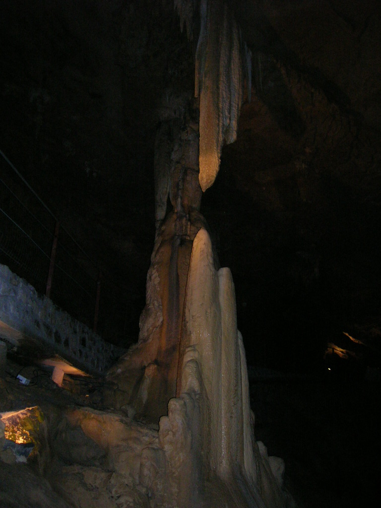 Interno delle grotte di Bétharram